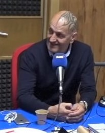 El que fuera contertulio del mítico programa Crónicas Marcianas, Coto Matamoros en el año 2018.